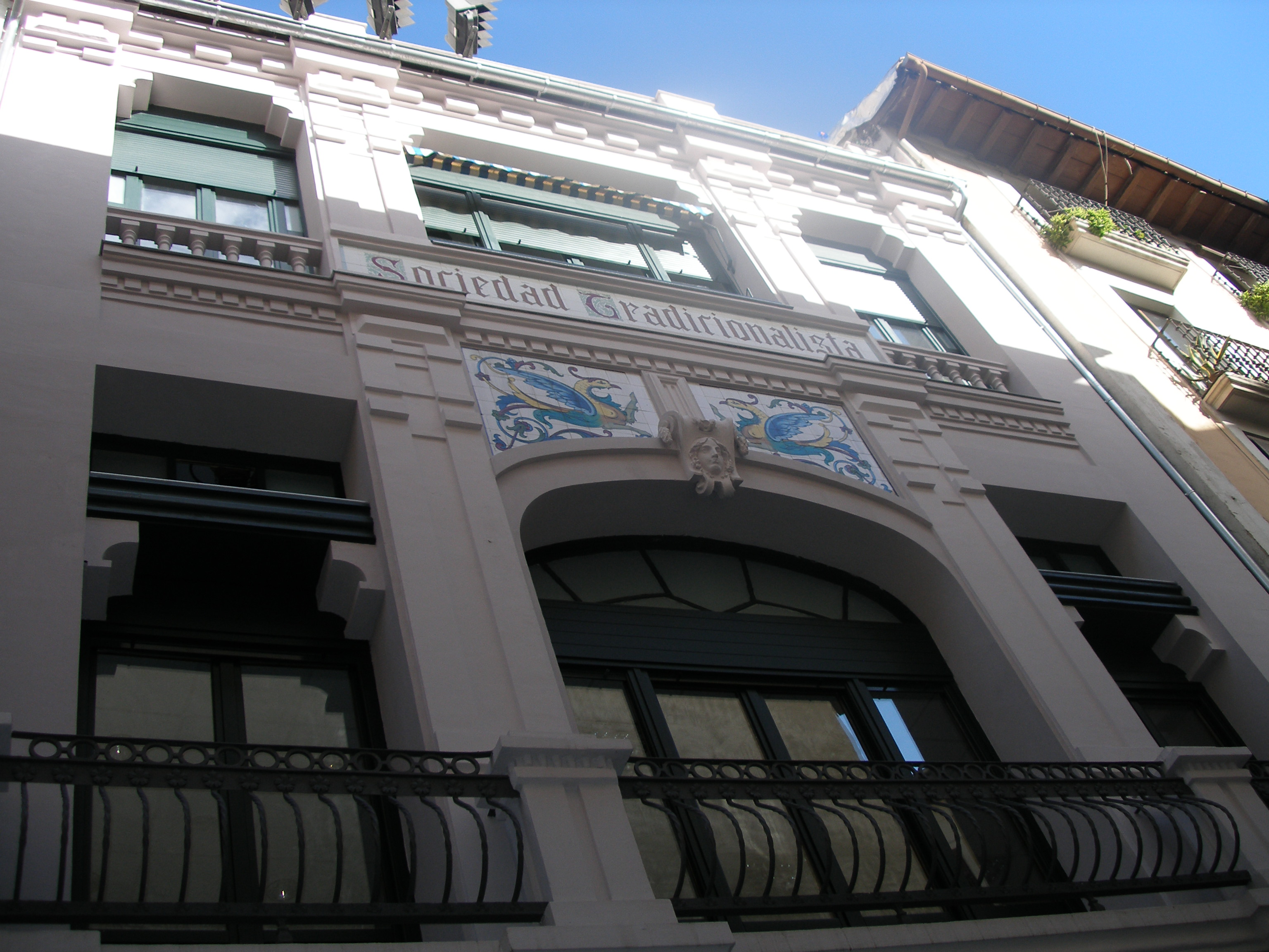 Iruñako etxe karlista zaharra